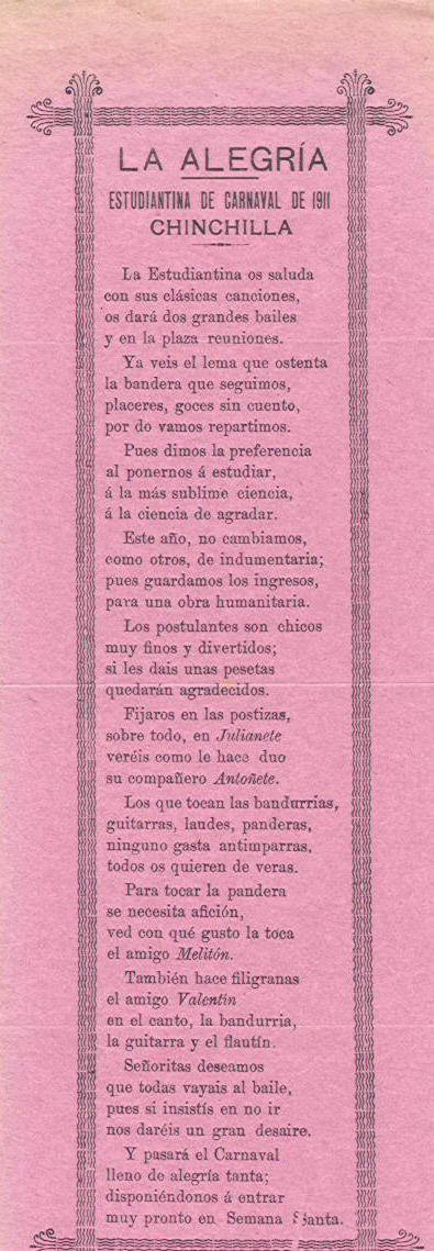 Un document imprimé par l'Estudiantina de la ville de Chinchilla de Monte-Aragón à l'occasion du Carnaval.